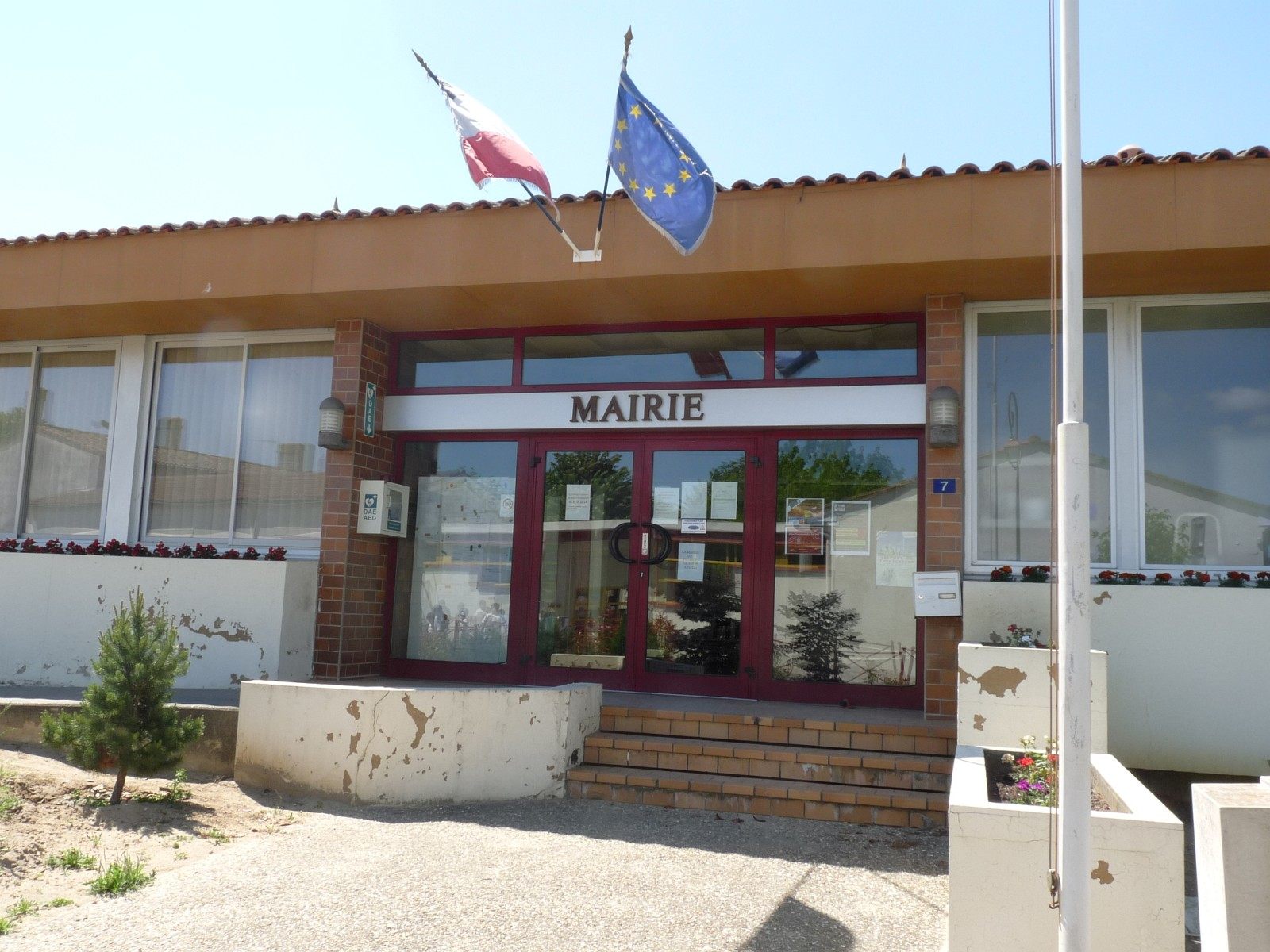 Mairie, Cadillac-en-Fronsadais, Gironde, France